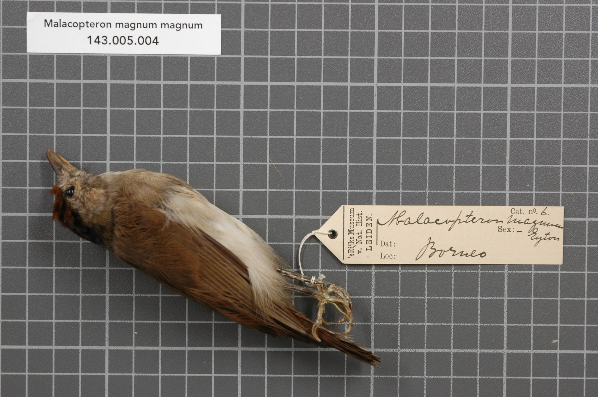 Malacopteron magnum magnum Eyton, 1839